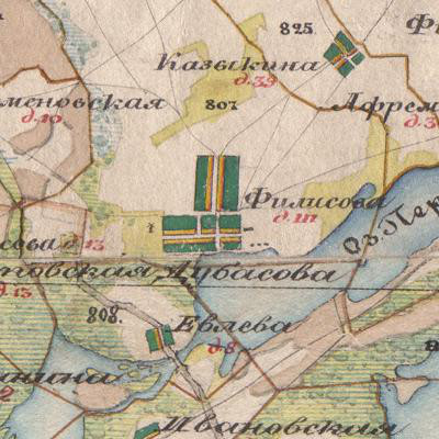 Деревня Филисово на карте 1850 года